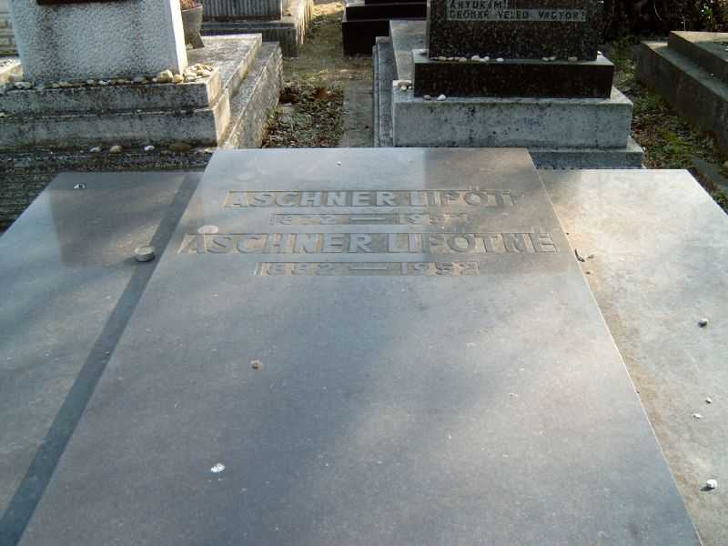 Aschner Lipót (Asakürt, 1872. január 27. – Budapest, 1952. január 18.) magyar gyáros, 1921-től az Egyesült Izzólámpa és Villamossági Rt. vezérigazgatójának sírja Budapesten. Kozma utcai zsidó temető: 3C-1-18